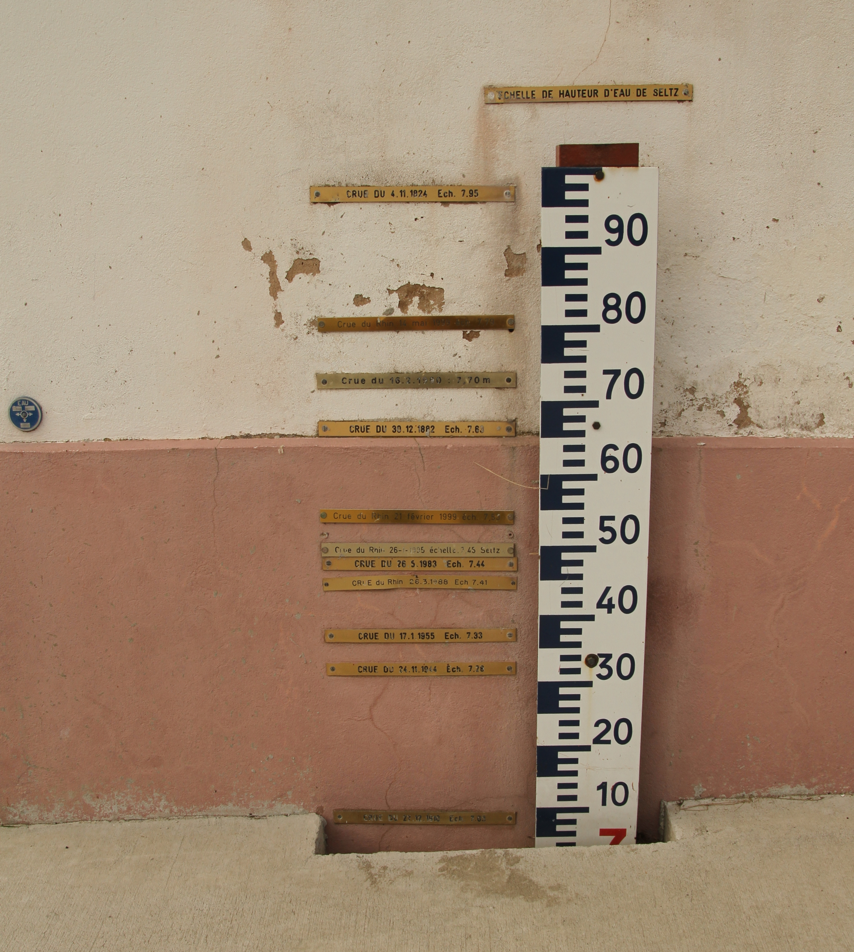 Die Pegelstände der Rheinhochwasser bei der Fähre Seltz-Plittersdorf auf französischer Seite.